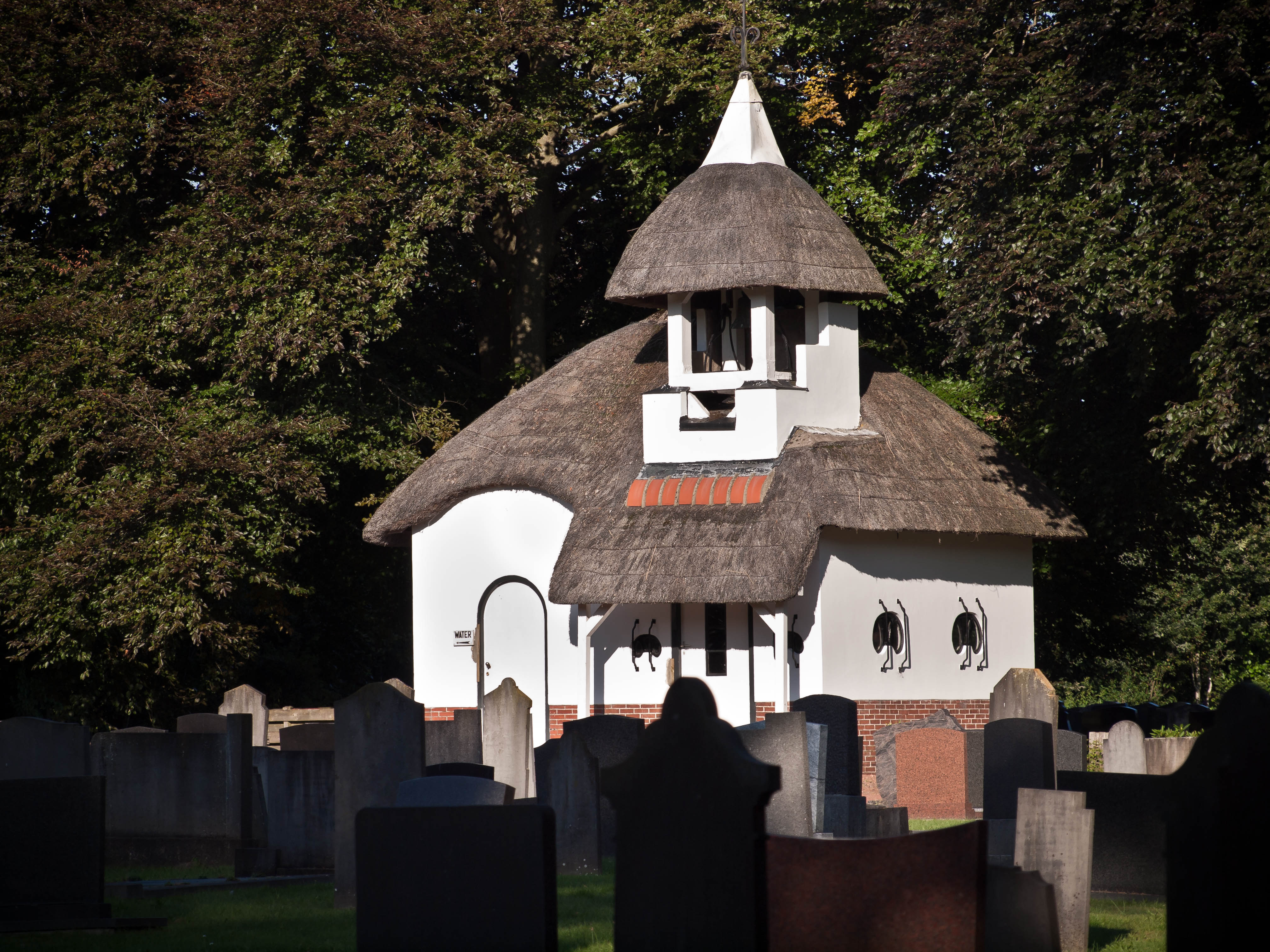 Lijkenhuisje algemene begraafplaats Surhuisterveen.